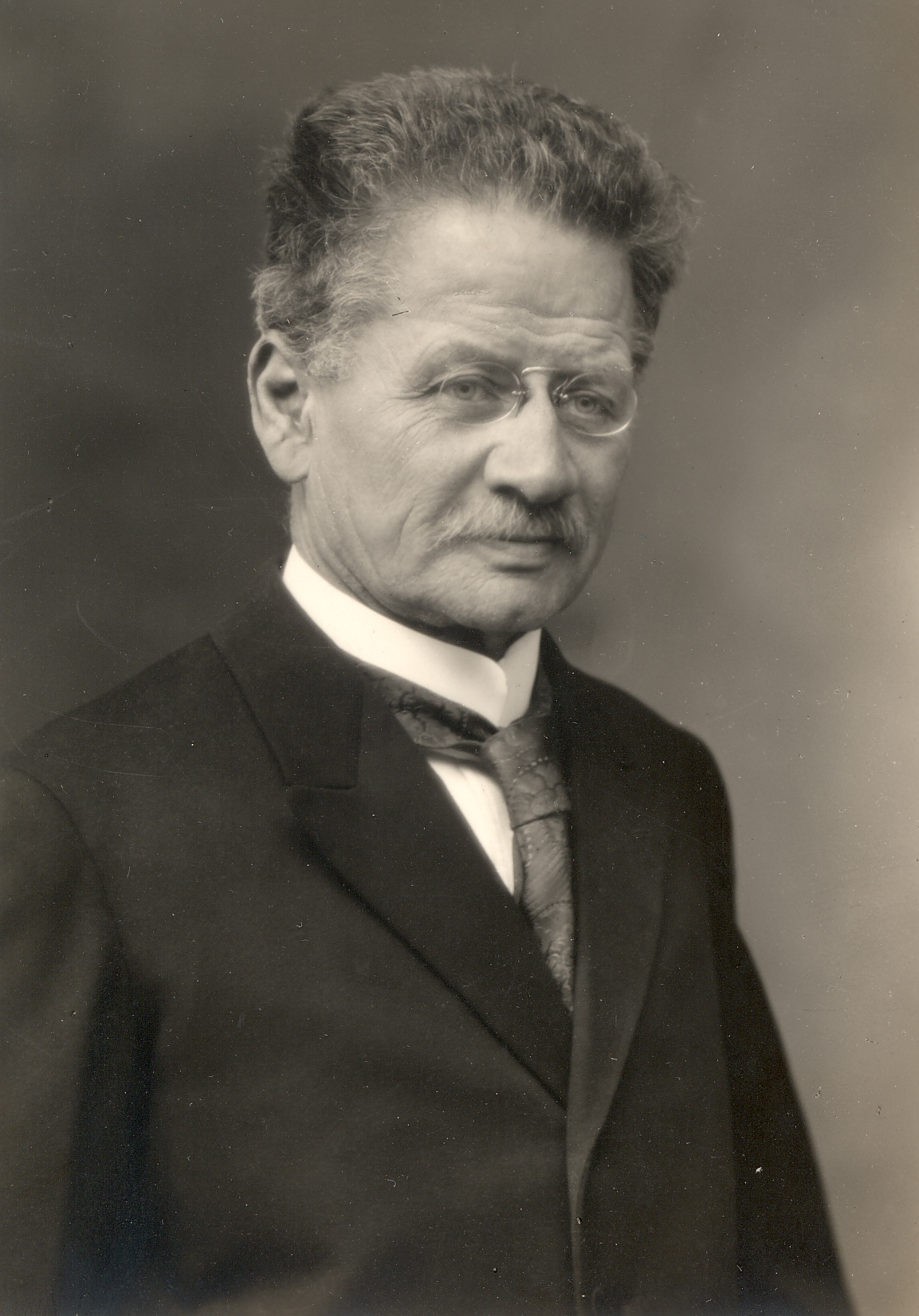 Prof. Dr. Albert Büchi, im Jahr 1924. Original wurde von mir fotografiert für Publikation in Wikipedia unter Lizenz CC-BY-SA.